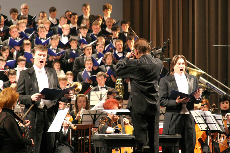 Саратовский академический театр оперы и балета. Исполнение симфонического Евангелия Алемдара Караманова «Совершишася»